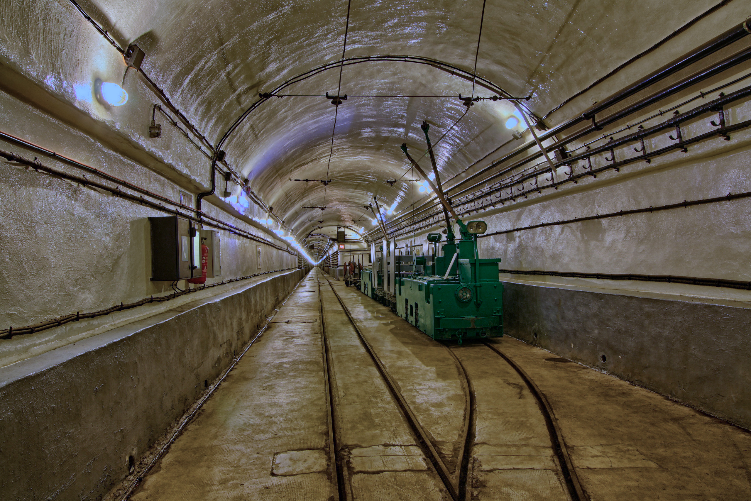 Ligne Maginot - Schoenenbourg